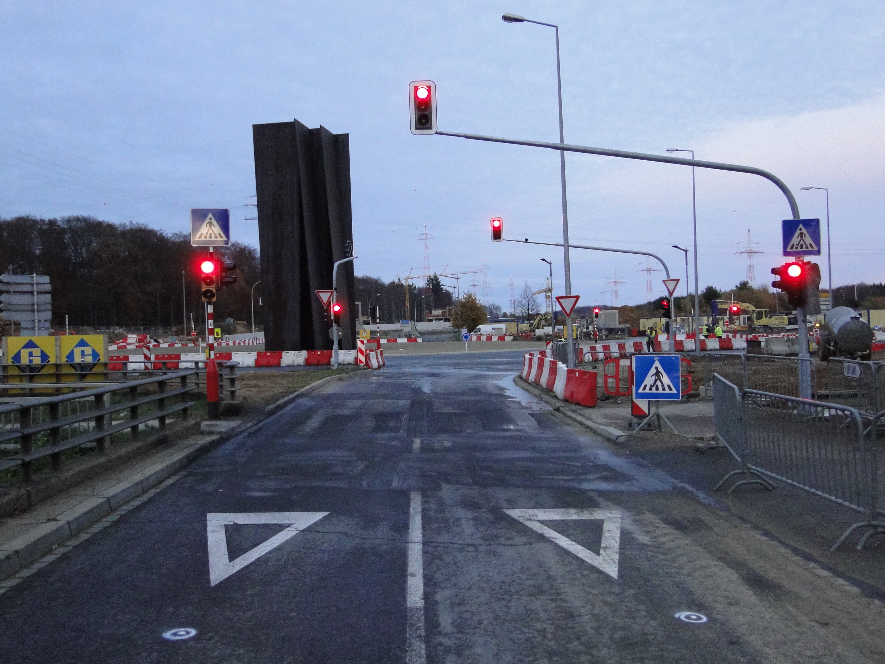 Rond-point Serra: travaux préparatoires pour la mise en service en "rond-point Turbo". Accès rond-point depuis l'avenue John F. Kennedy